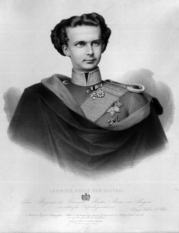 Ludwig II. von Bayern, aus Regensburger Portraitsammlung